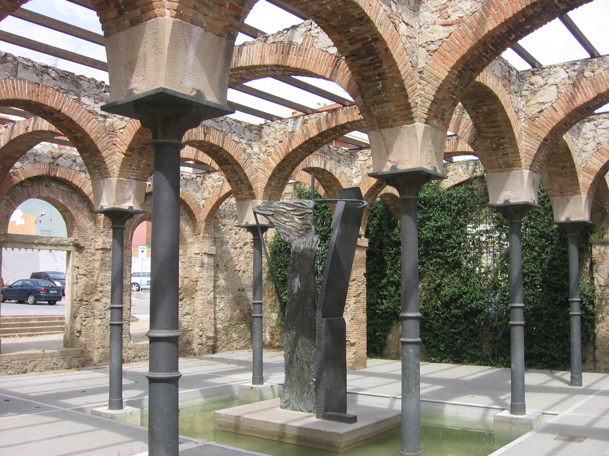 Parque del Clot.